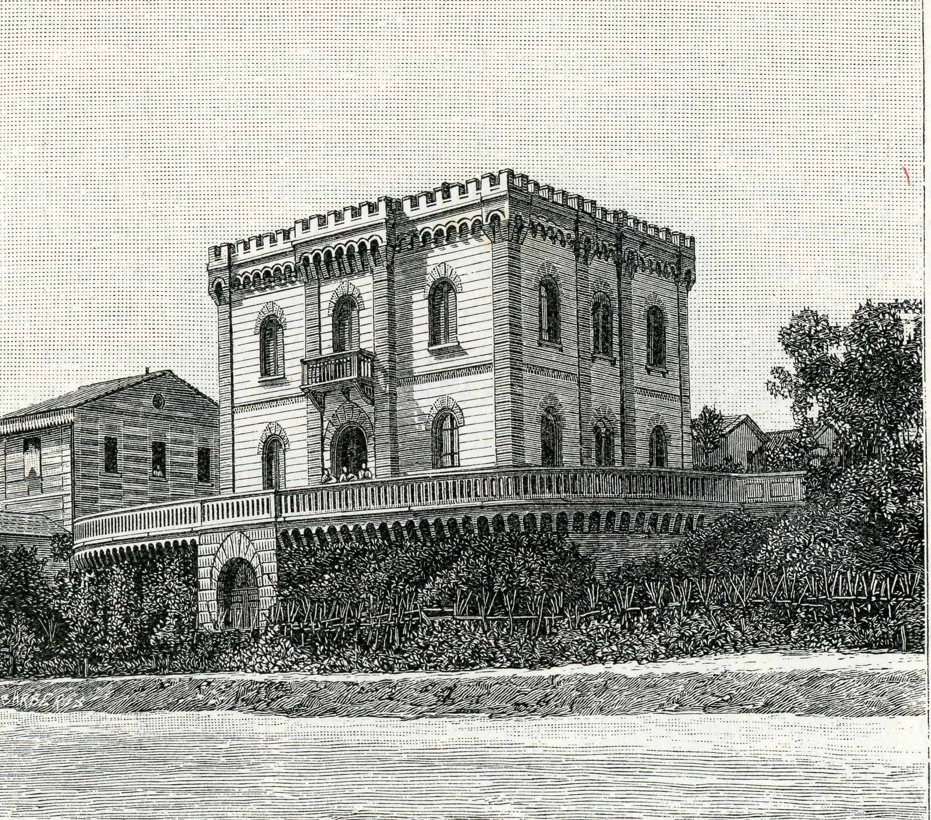 Vasto (dintorni): villa Marchesani (xilografia di Barberis 1898).